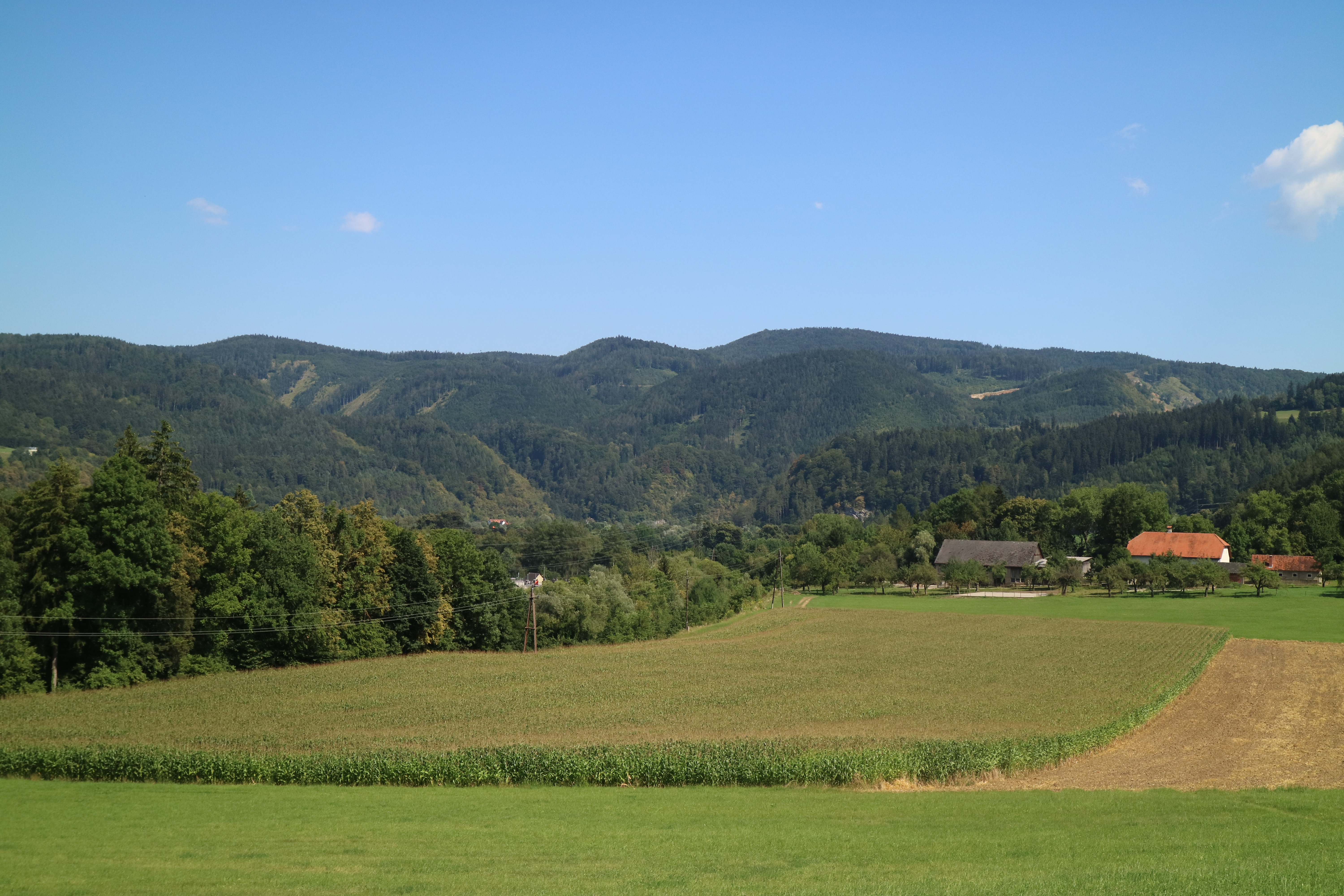 Tanneben von Nordwesten, Gemeinde Frohnleiten, Steiermark